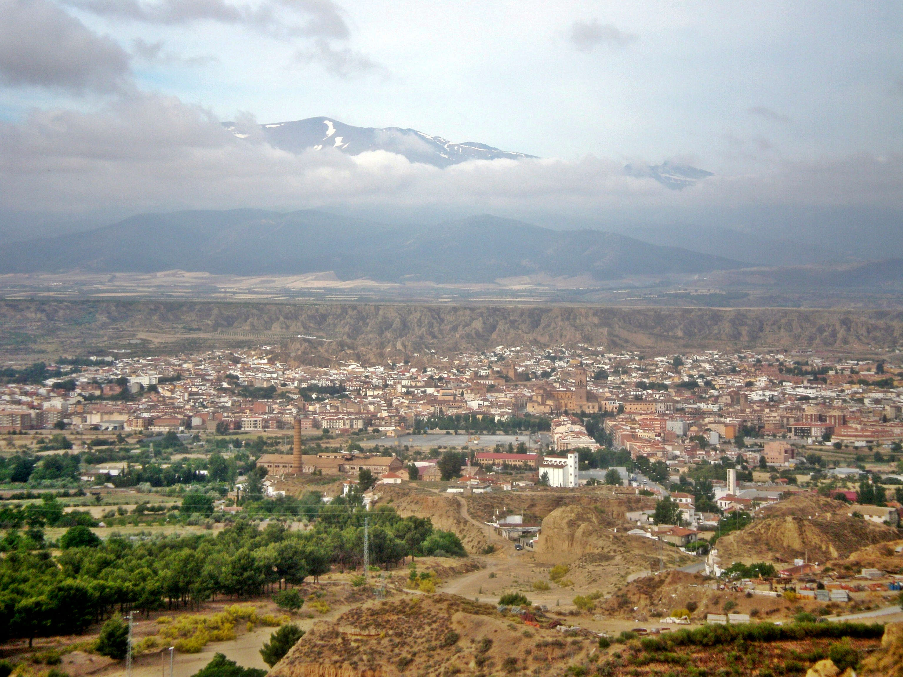 tras guadix, sierra nevada